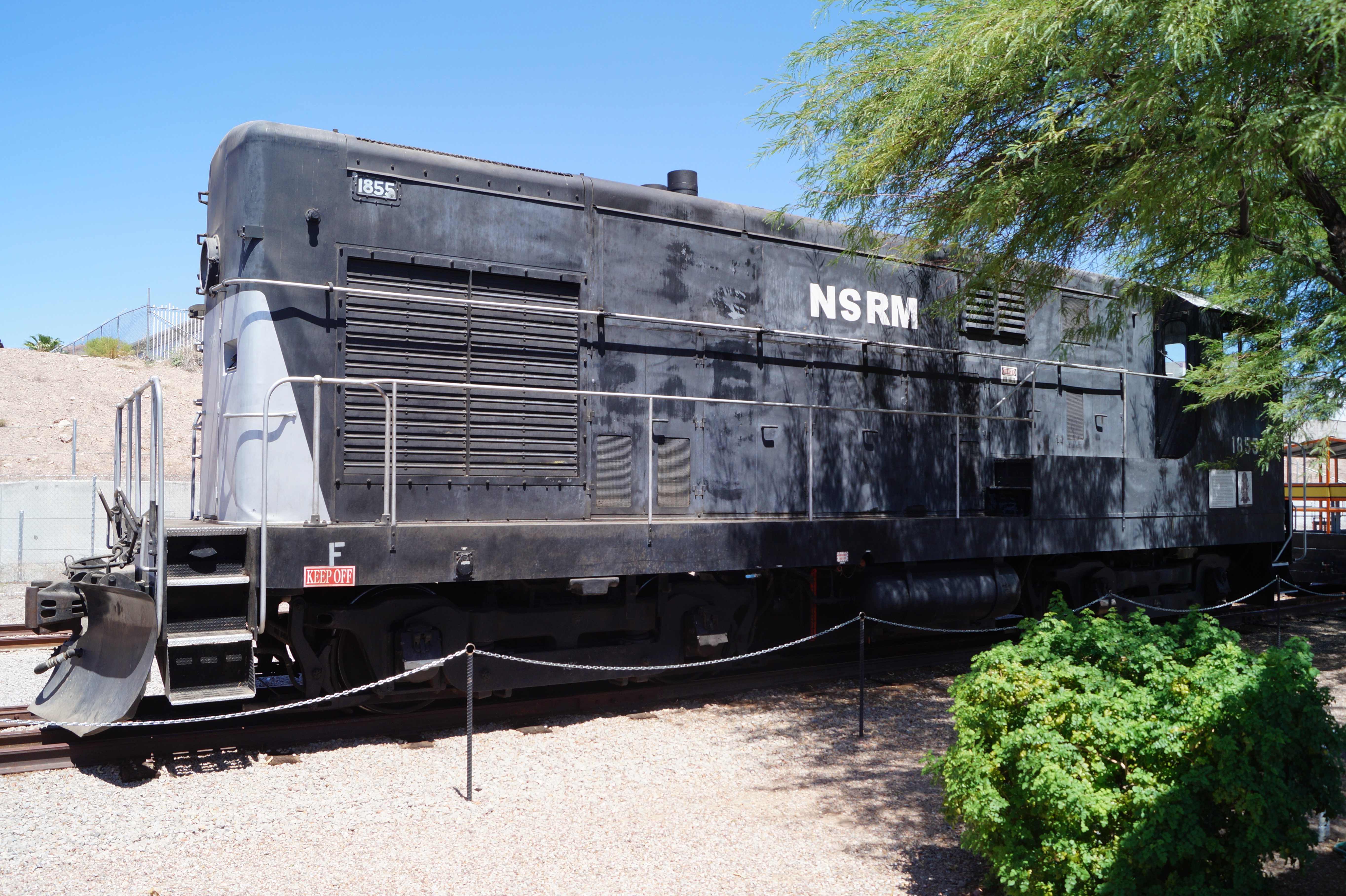 The Nevada State Railroad Museum which is an agency of the Nevada Department of Cultural Affairs. It is located at Yucca Street on the tracks of the historic Union Pacific Railroad branch Henderson-Boulder City near the former Boulder City Railroad Yards where the Hoover Dam construction equipment was unloaded in the 1930s.